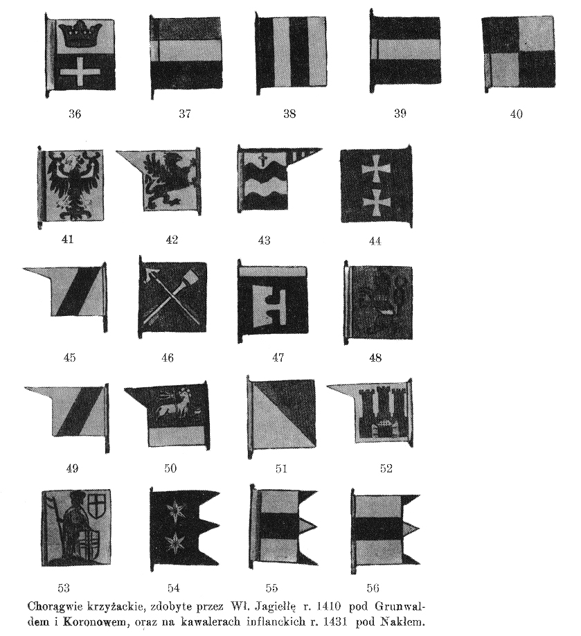 "Chorągwie krzyżackie zdobyte przez Wł. Jagiełłę r. 1410 pod Grunwaldem i Koronowem oraz na kawalerach inflanckich r. 1431 pod Nakłem"